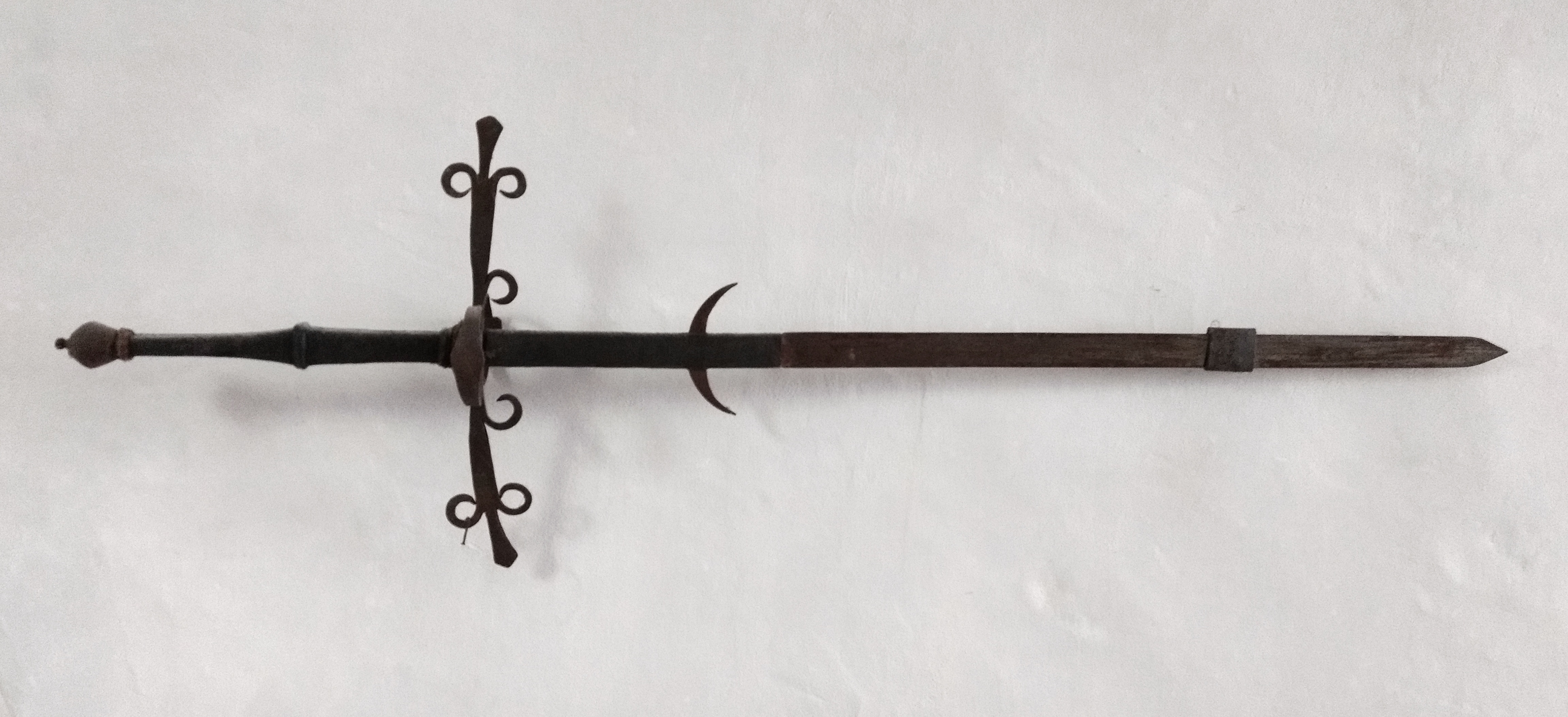 Gassenhauer Pfalzgrafenstein